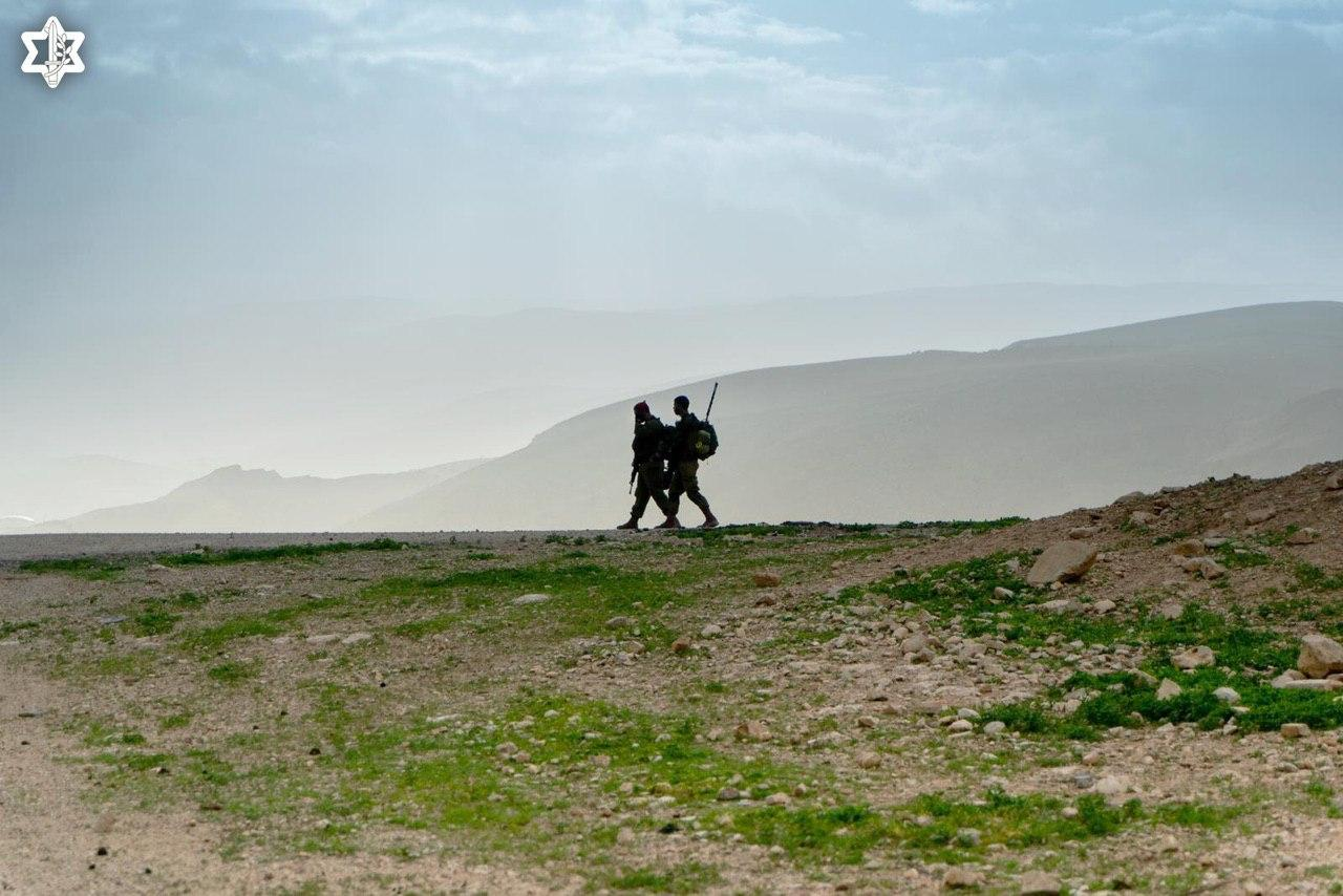 idfقدم زدن سربازان